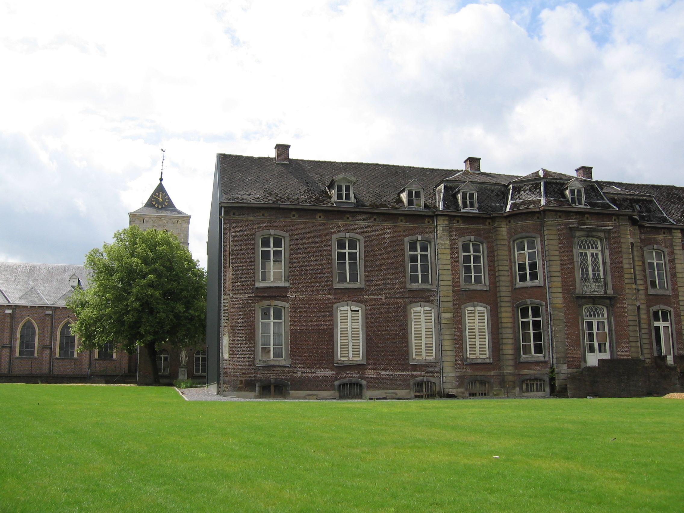 Ancien palais abbatial de l'abbaye de Munsterbilzen (Belgique), avec en arrière-plan l'église dont le clocher était celui de l'église abbatiale